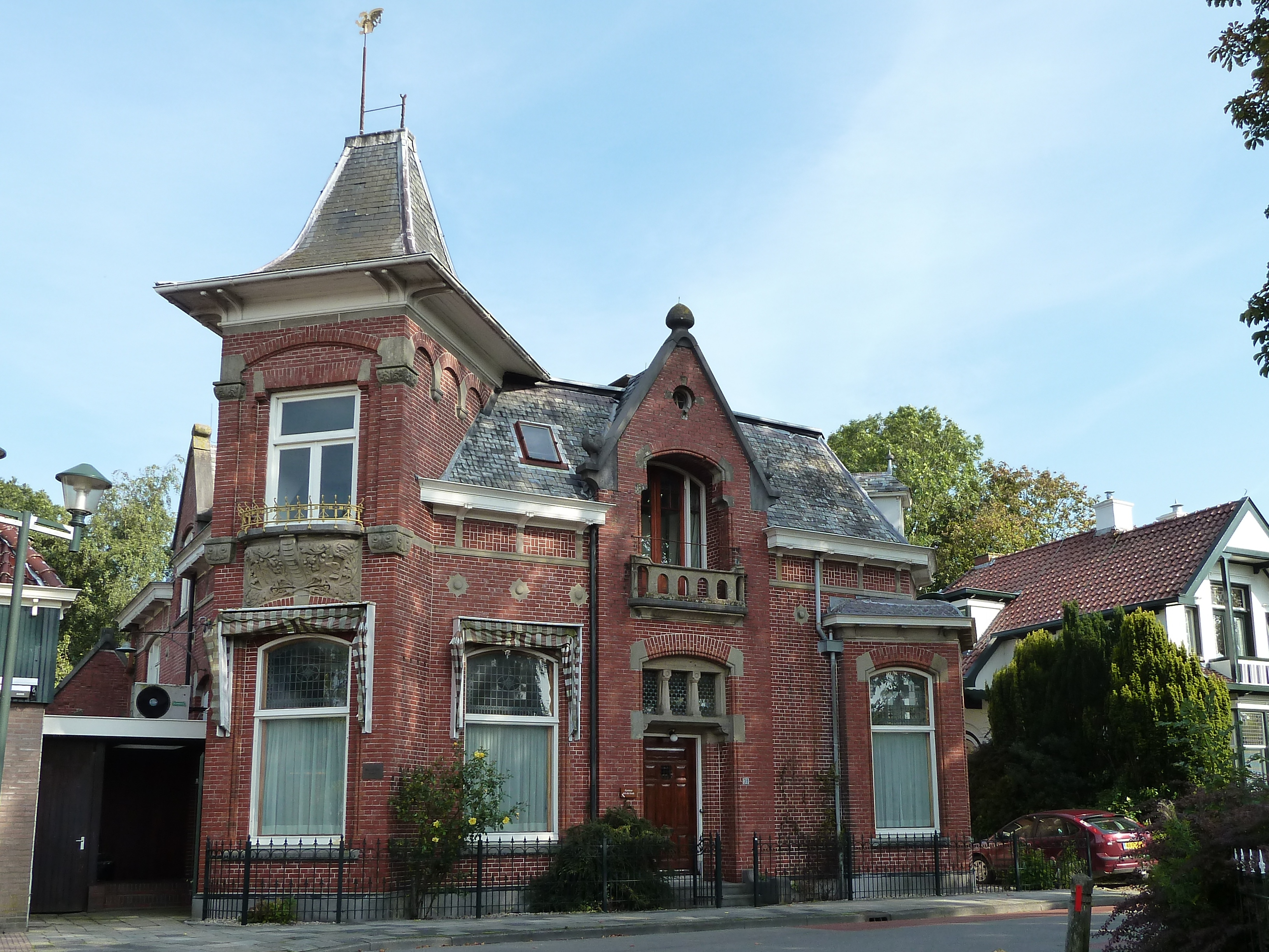 Notariswente (1911) yn Gryptsjerk, ûntwurpen troch de arsjitekt P. van de Wint (1865-1940).